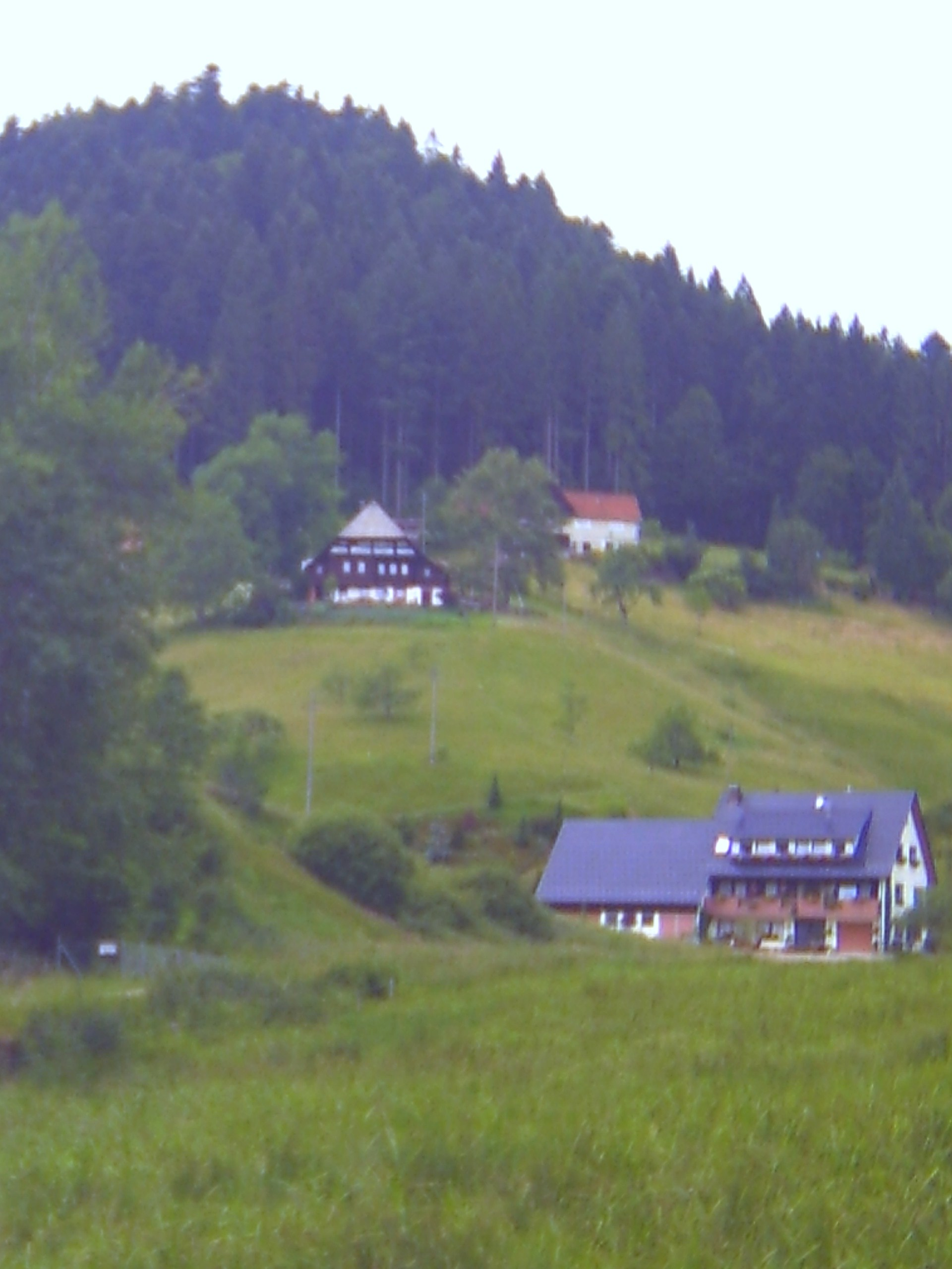 Upper Heubach